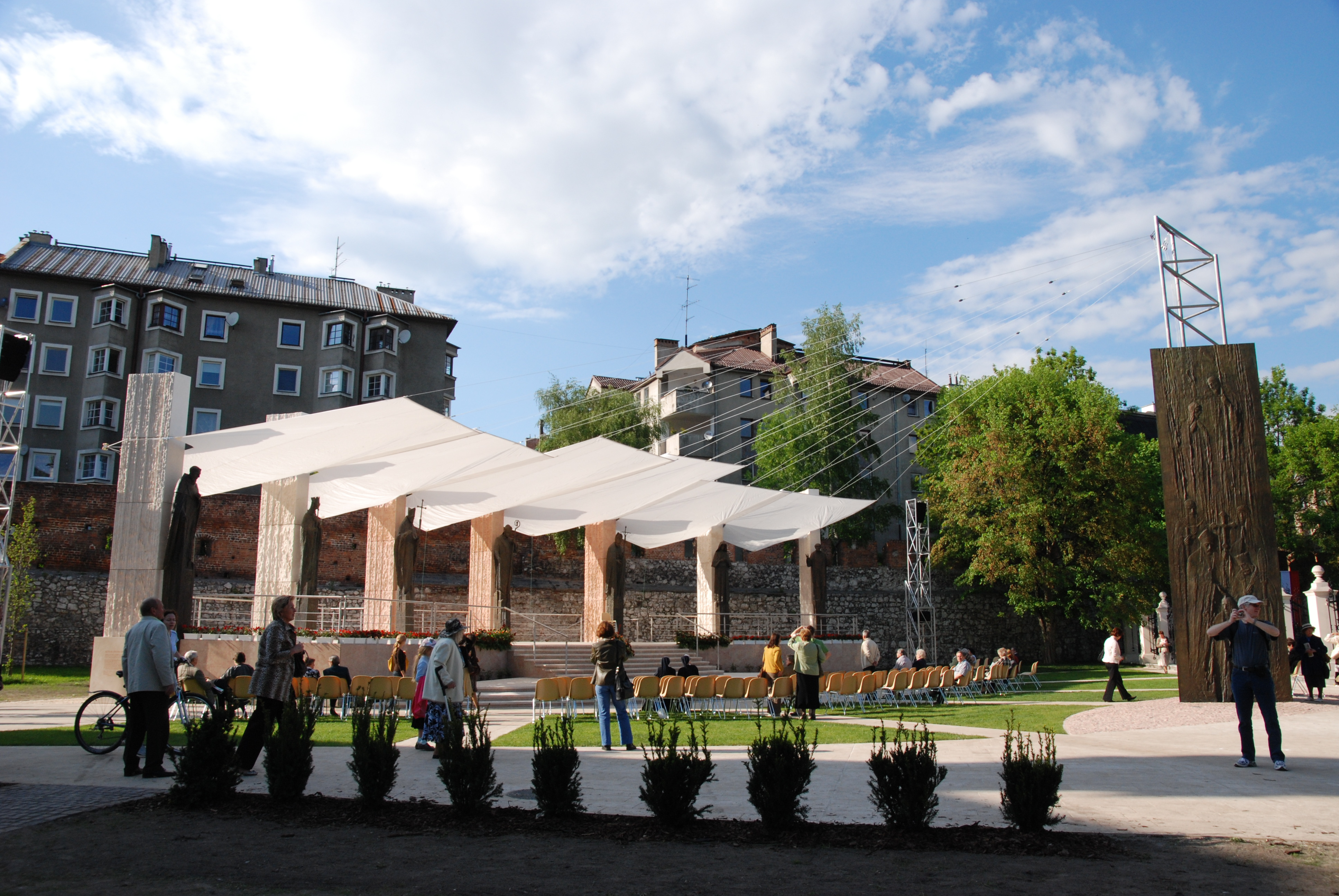 Ołtarz Trzech Tysiącleci, klasztor na Skałce, Kraków.